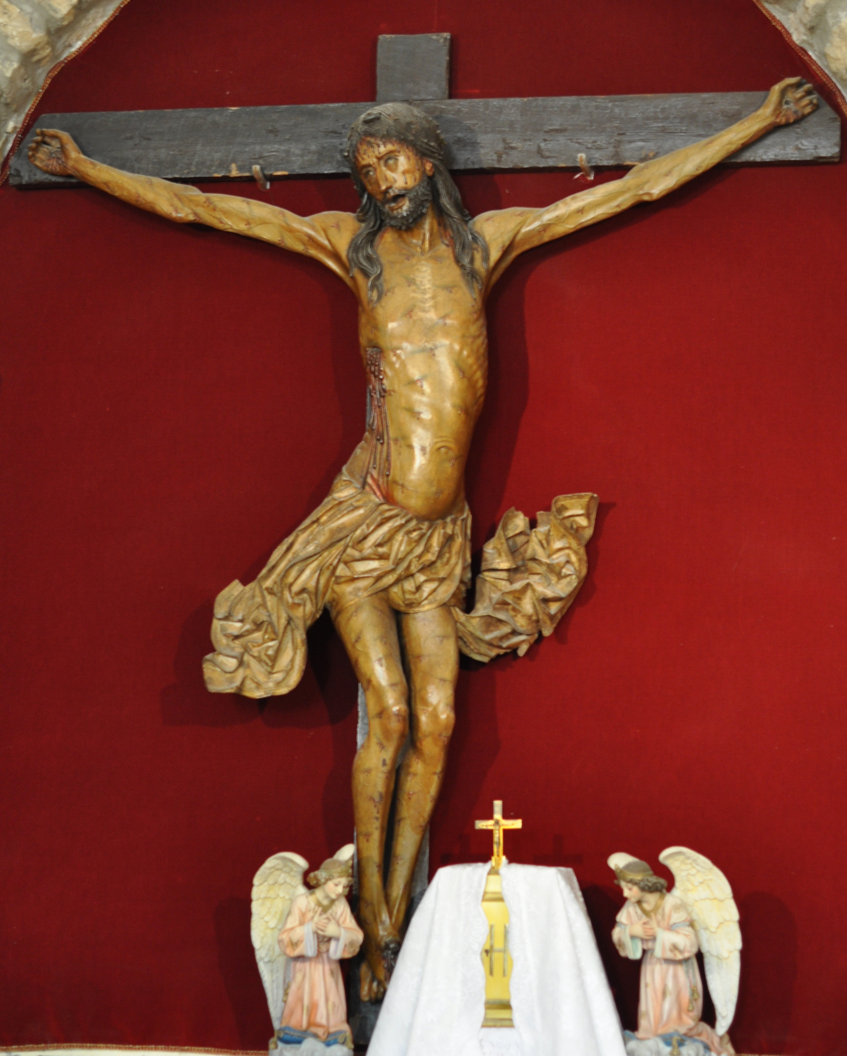 Cristo Crucificado que coronaba el desaparecido retablo de la Capilla del Colegio de San Gregorio de Valladolid. Jesús Urrea -antiguo director del hoy museo nacional Colegio de San Gregorio-, localizó el antiguo Crucifijo titular de la capilla del Colegio en la iglesia de Ciguñuela, un pueblo aledaño a Valladolid. Por la noticia de su origen, 12 por su gran envergadura (muy superior en tamaño a las restantes imágenes del retablo, 2 metros de alto por 1,90 de ancho), y por su tipológía y características la identificación era concluyente.